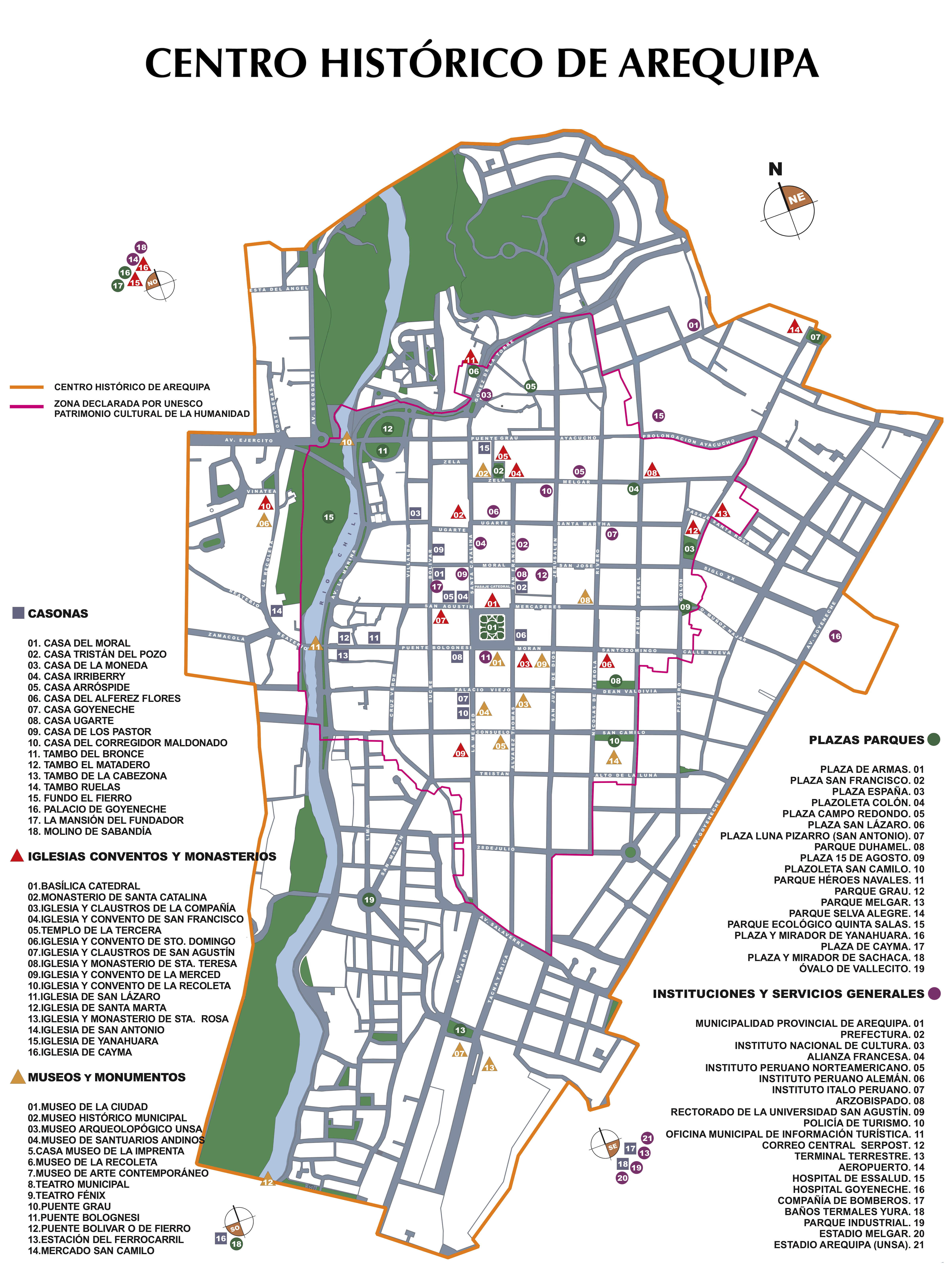 Mapa del Centro Histórico de Arequipa y de la zona declarada Patrimonio de la Humanidad.